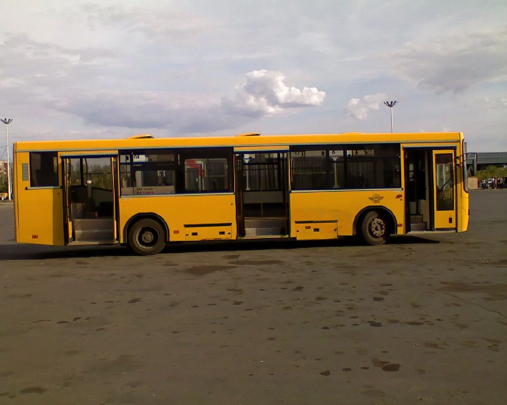 Автобус НефАЗ в Набережных Челнах